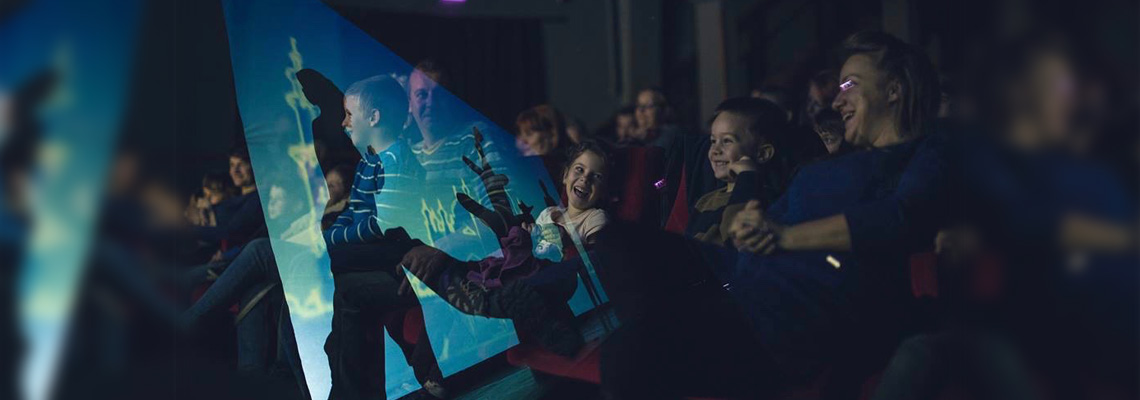 Выступление на фестиваля для детей